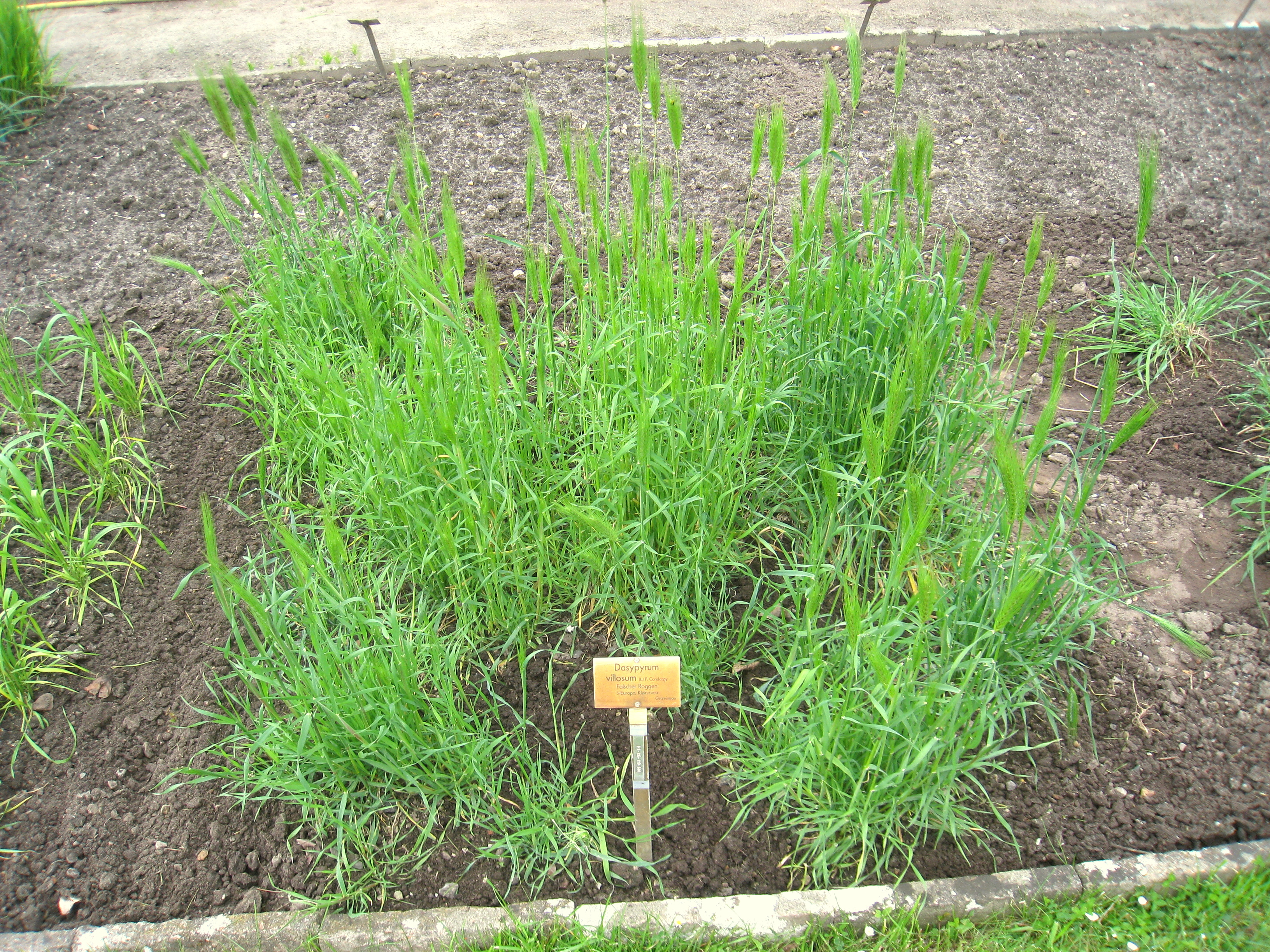 Dasypyrum villosum specimen in the Botanischer Garten, Berlin-Dahlem (Berlin Botanical Garden), Berlin, Germany.